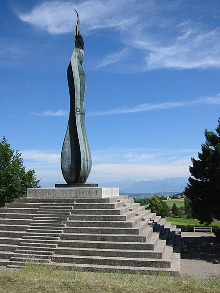 Wehrmännerdenkmal auf der Forch bei Zürich.